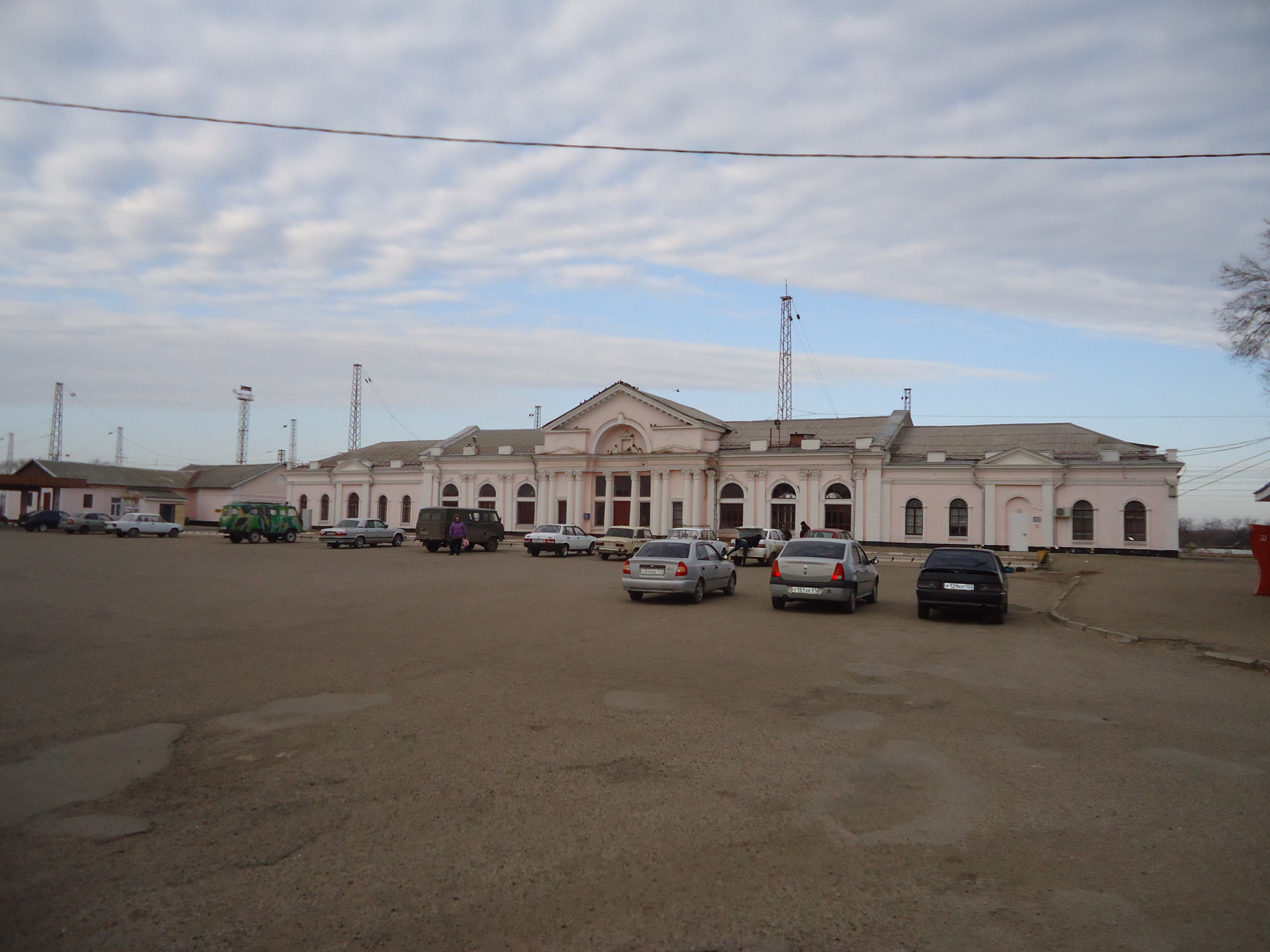 место, где находился революционный отряд д.п.жлобы: ж/д ст.кущевская, Кущёвский район, Краснодарский край